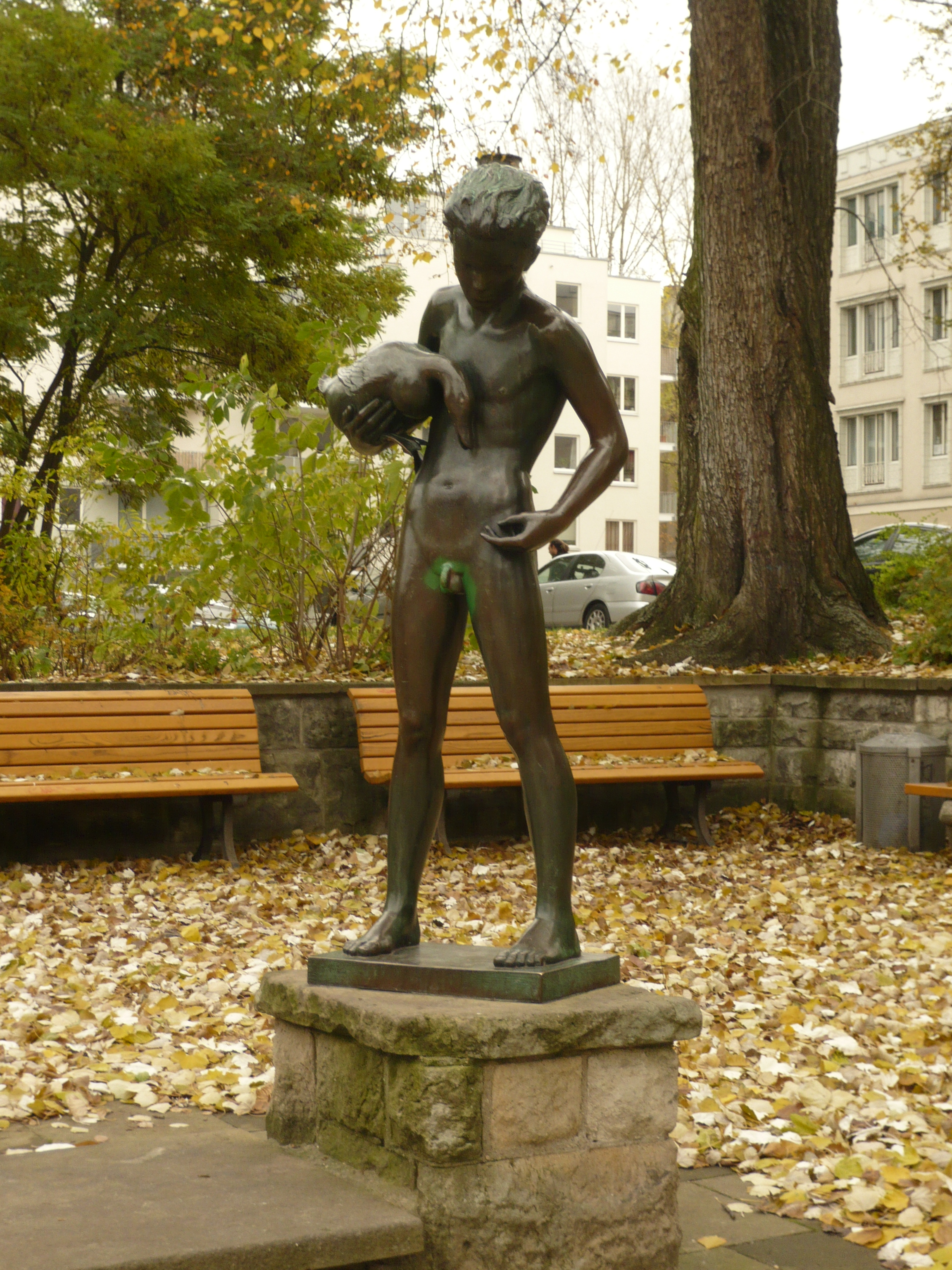 Weberwiese im Ortsteil Berlin-Friedrichshain/ Bronzestatue